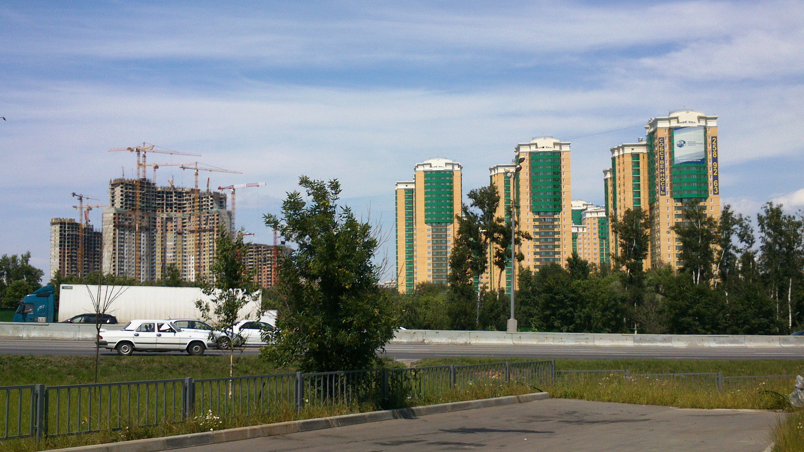 Сданные в эксплуатацию и строящиеся дома микрорайона Загорье в районе Бирюлёво Восточное, Москва.